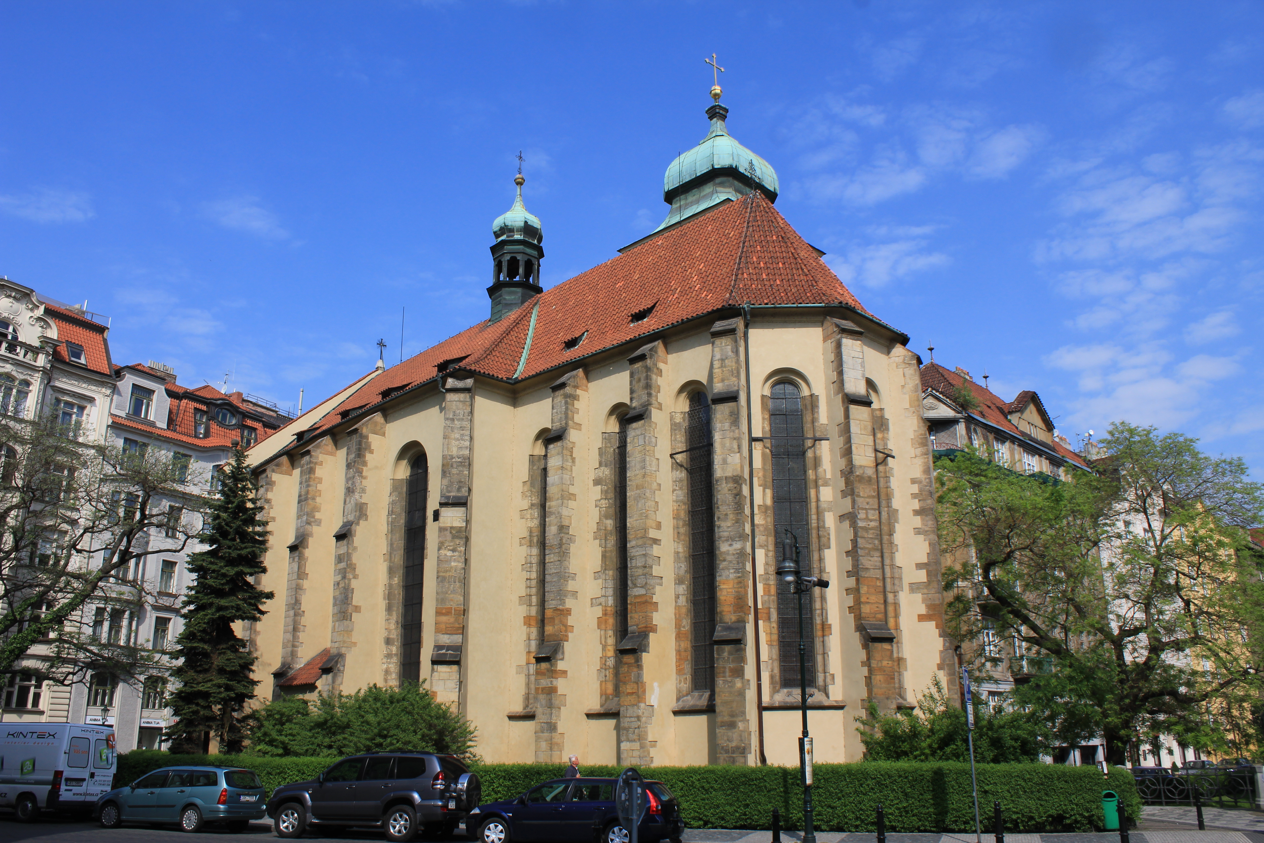 Den hellige ånds kirke i Josefov